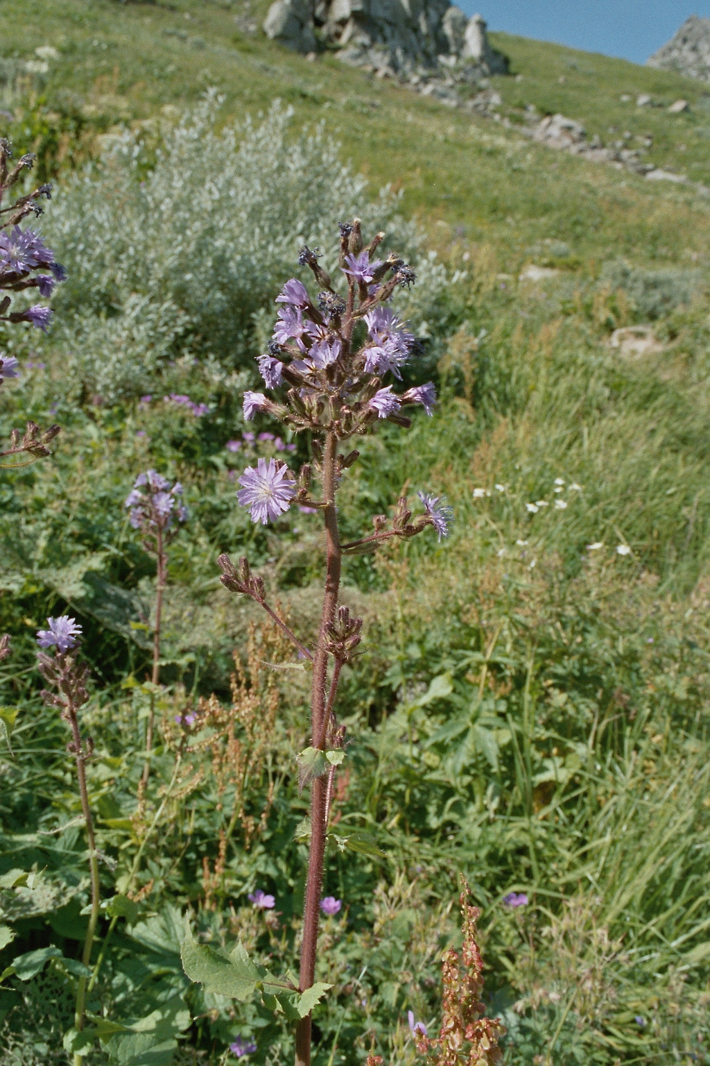 Mulgédie des Alpes (Cicerbita alpina) dans les monts Dore (Massif central, France)